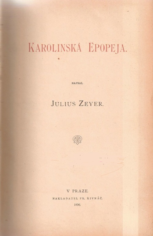 Titulní strana prvního vydání Karolinské epopeje od Julia Zeyera z roku 1896